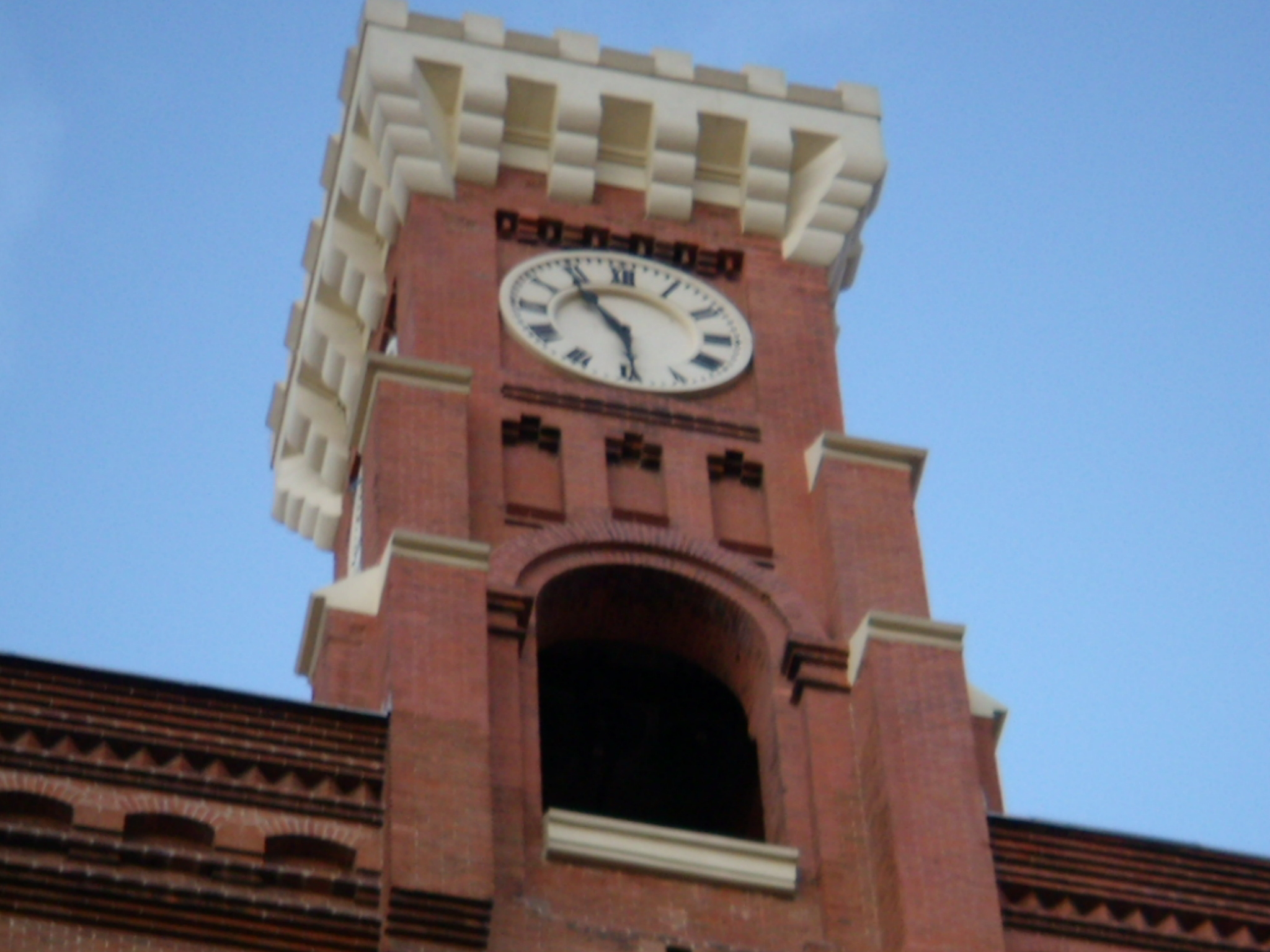 Torre del reloj en la Iglesia de la Inmaculada y San Pedro Claver by Enrique Fort y Antonio Palacios (1903-10). Arte Neomudéjar. Ref: Desarrollo Urbano y Estilos Arquitectónicos por Joaquín Bosque Maurel . Boletín de la Real Sociedad Geográfica, 2001-2002. Universidad Pontificia Comillas. Madrid. Calle Santa Cruz de Marcenado.